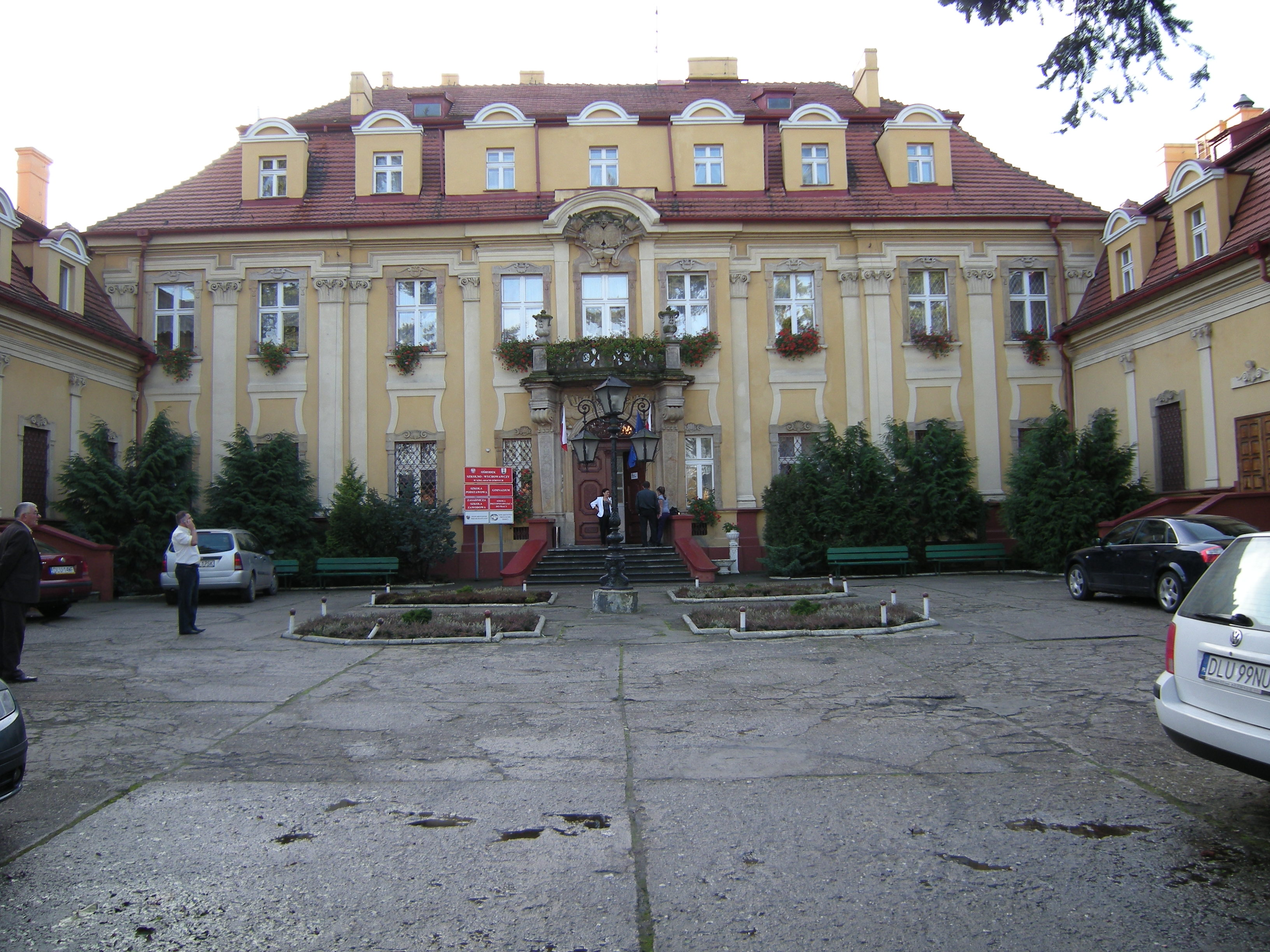 Pałac w Szklarach Górnych koło Lubina 11.05.51.